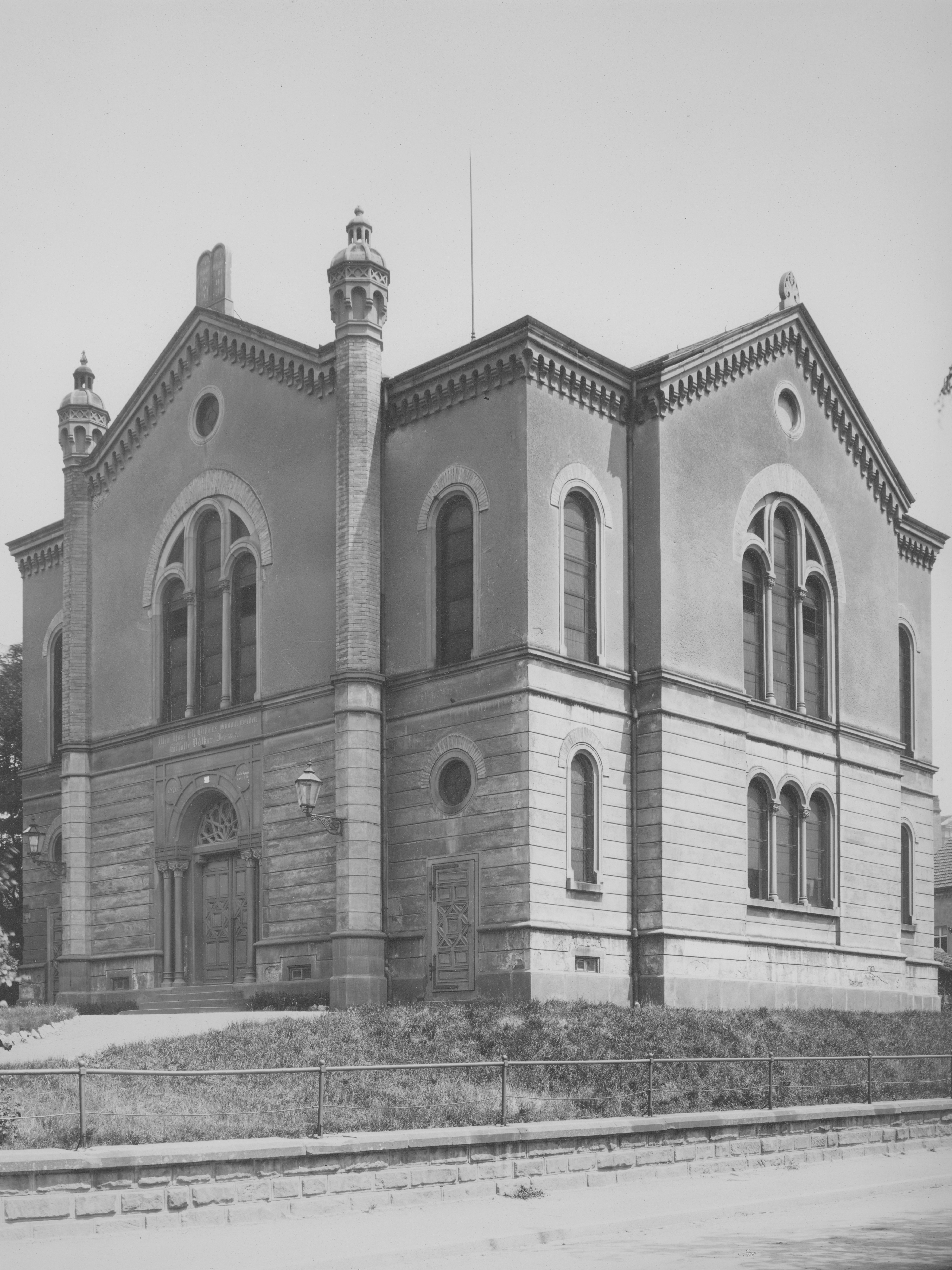 Freiburg, Eingangsfassade der Synagoge am Werthmannplatz